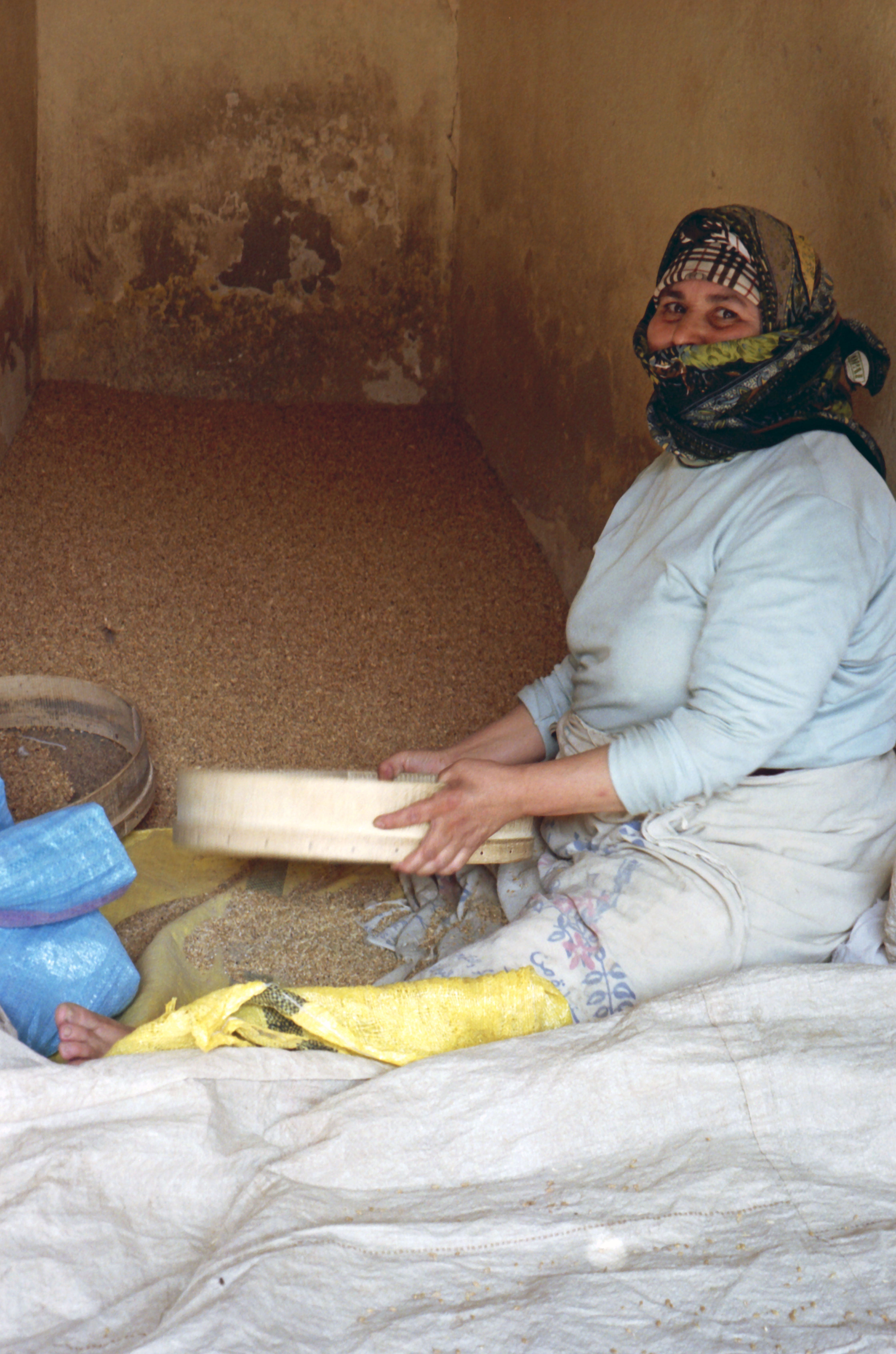 Morocco-113